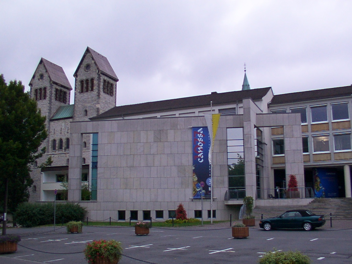 Paderborn: Städtische Galerie Am Abdinghof, im Hintergrund links die Abdinghofkirche